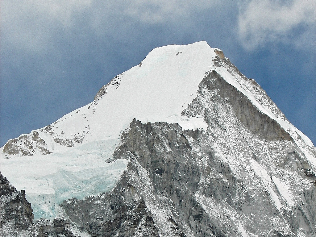 Taken from between EBC and Gorak Shep